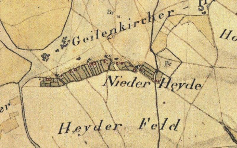 Kartenaufnahme der Rheinlande 1803-1820